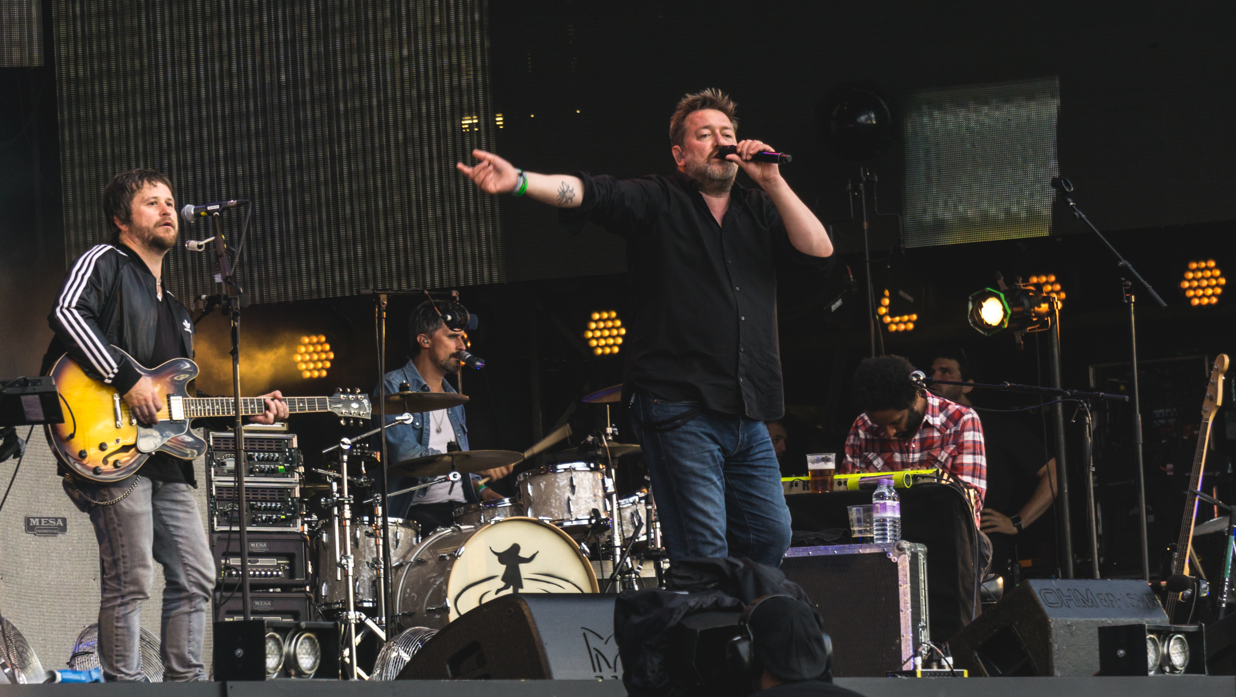 KillersBST080717-25